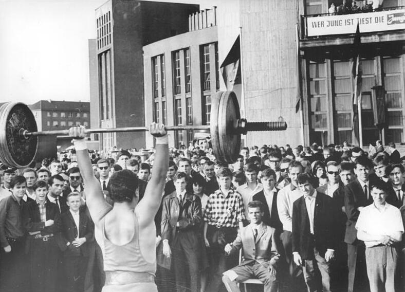 Berlin, Gewichtheber vor Menschenmenge Zentralbild Spremberg 08.10.1966 Berlin: 17. Jahrestag der Gründung der DDR-Gewichtheber werben für die Weltmeisterschaften.Vor dem Zentralen Klub der Jugend und Sportler in der Karl-Marx-Allee hatten die Gewichtheber bei ihren Vorführungen eine aufmerksame Zuschauerkulisse. Es war ein kleiner Vorgeschmack auf die Welt- und Europameisterschaften vom 15.- 21.10.1966 in der Berliner Dynamo-Halle.